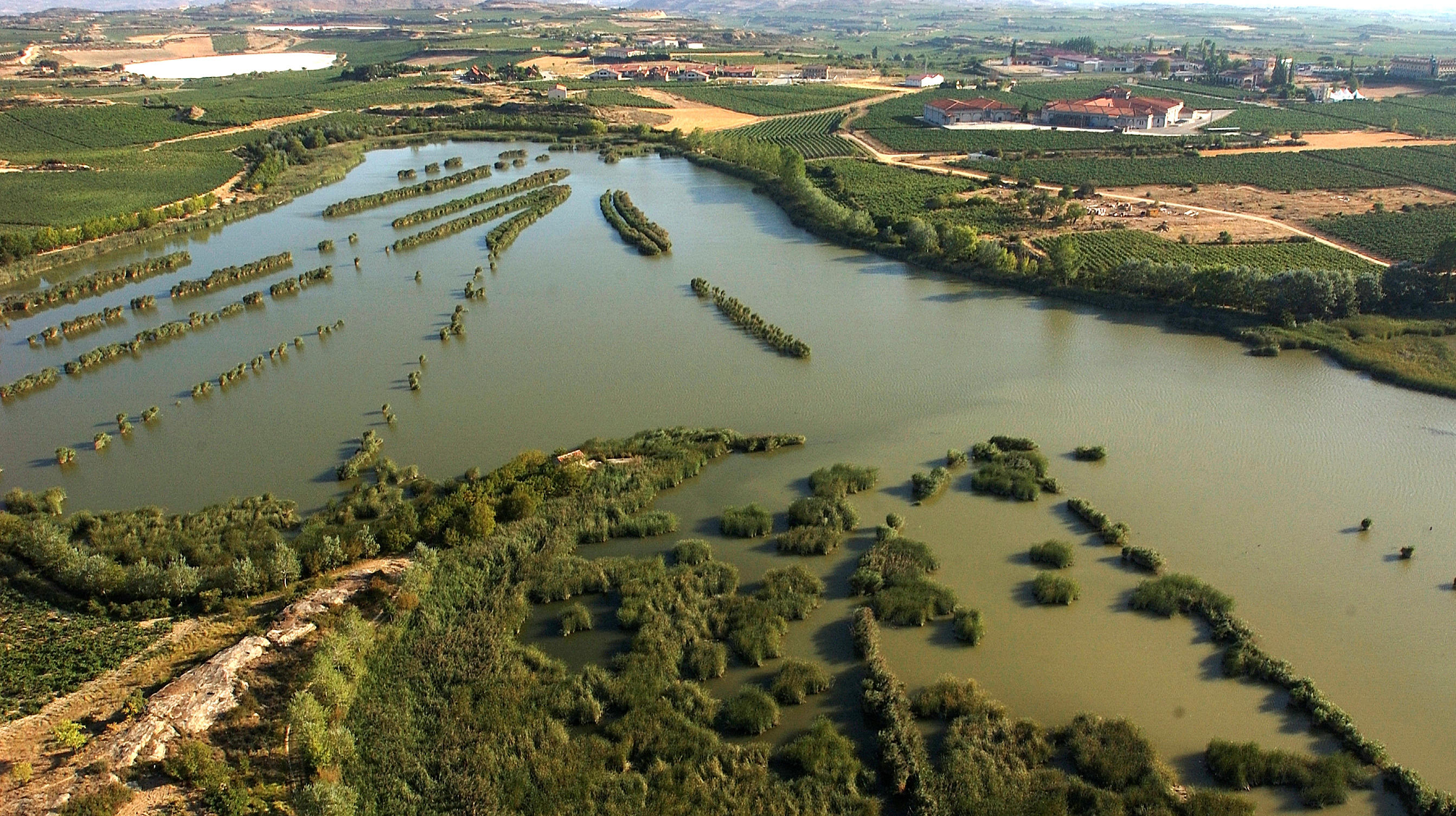 Humedal de Laguardia. Laguna This is a photography of a Site of Community Importance in Spain with the ID: ES2110021. Natura2000 entry, EEA entry